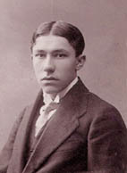 František Cink (1894-1943), český zakladatel prvního jazzového orchestru, houslista a kapelník